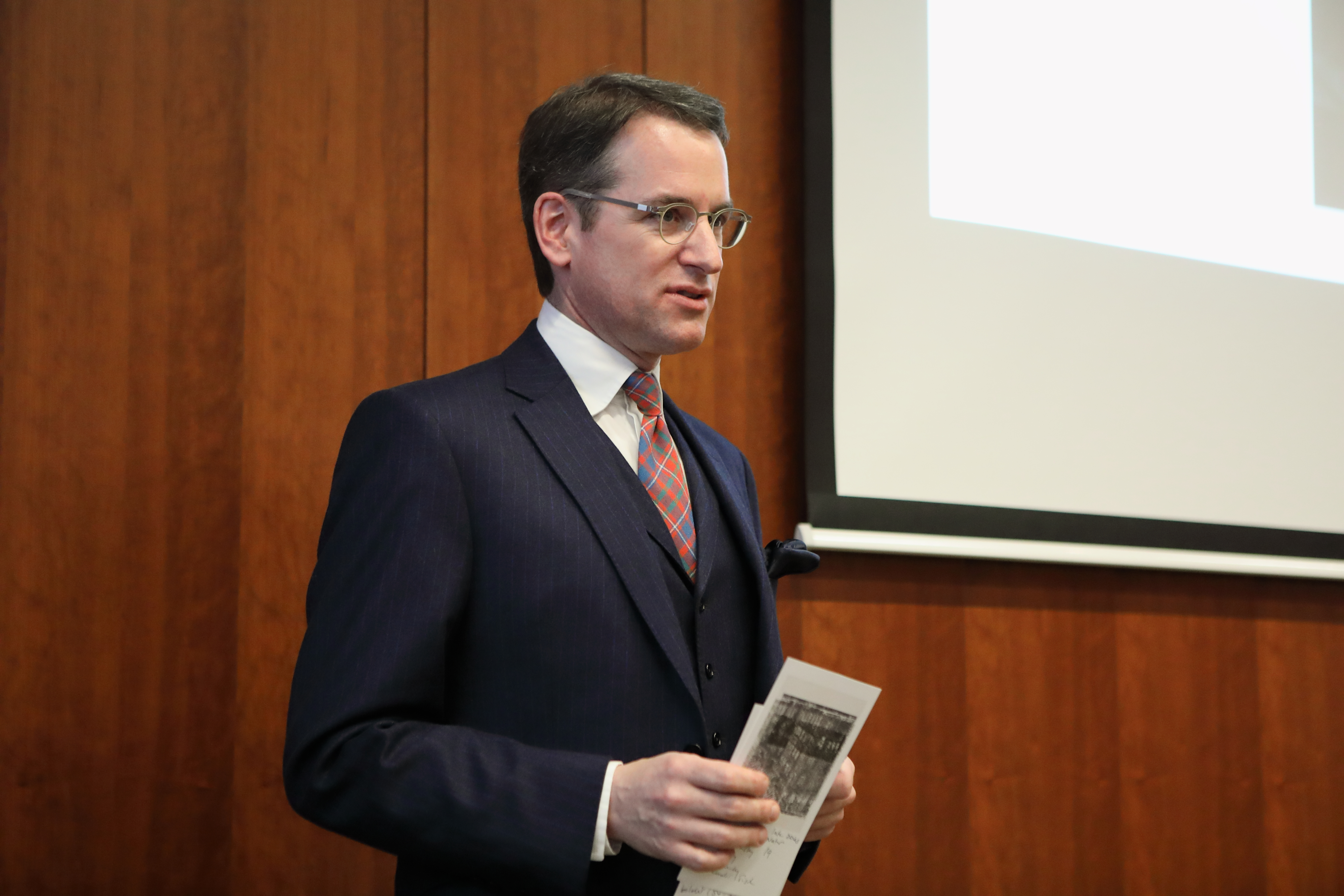 Christie’s President EMERI Dirk Boll